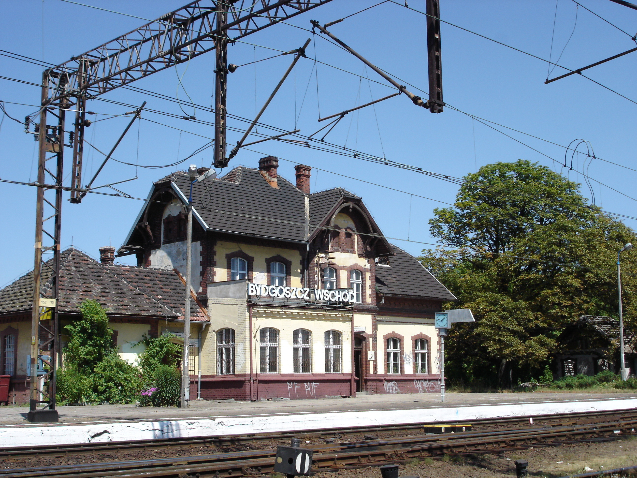 Bydgoszcz Wschód – stacja kolejowa w Bydgoszczy.